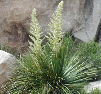 Nolina parryi or Giant Nolina.